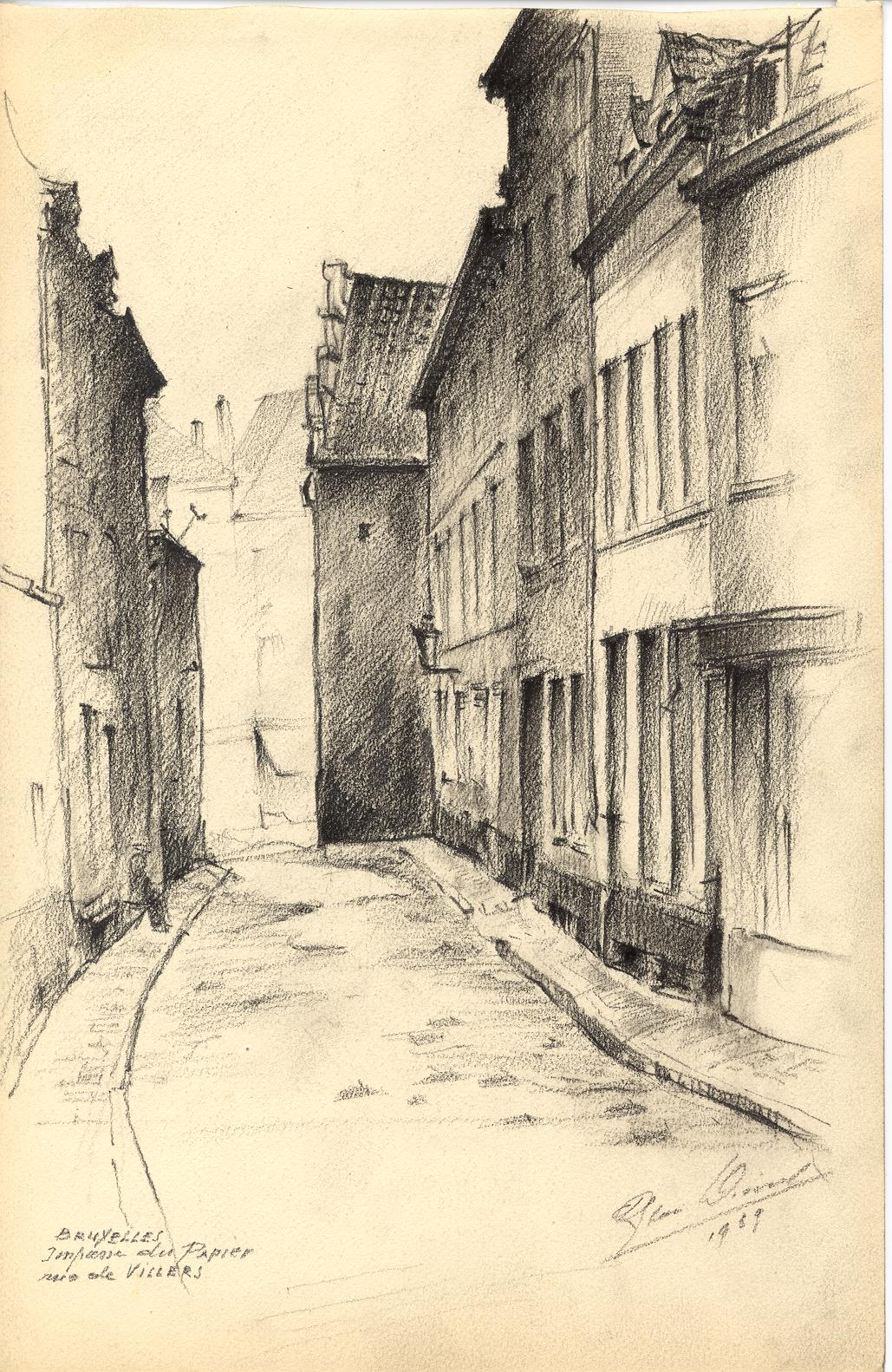 L'impasse du Papier à Bruxelles, dessin par Léon van Dievoet, architecte, fait le 14 juillet 1939